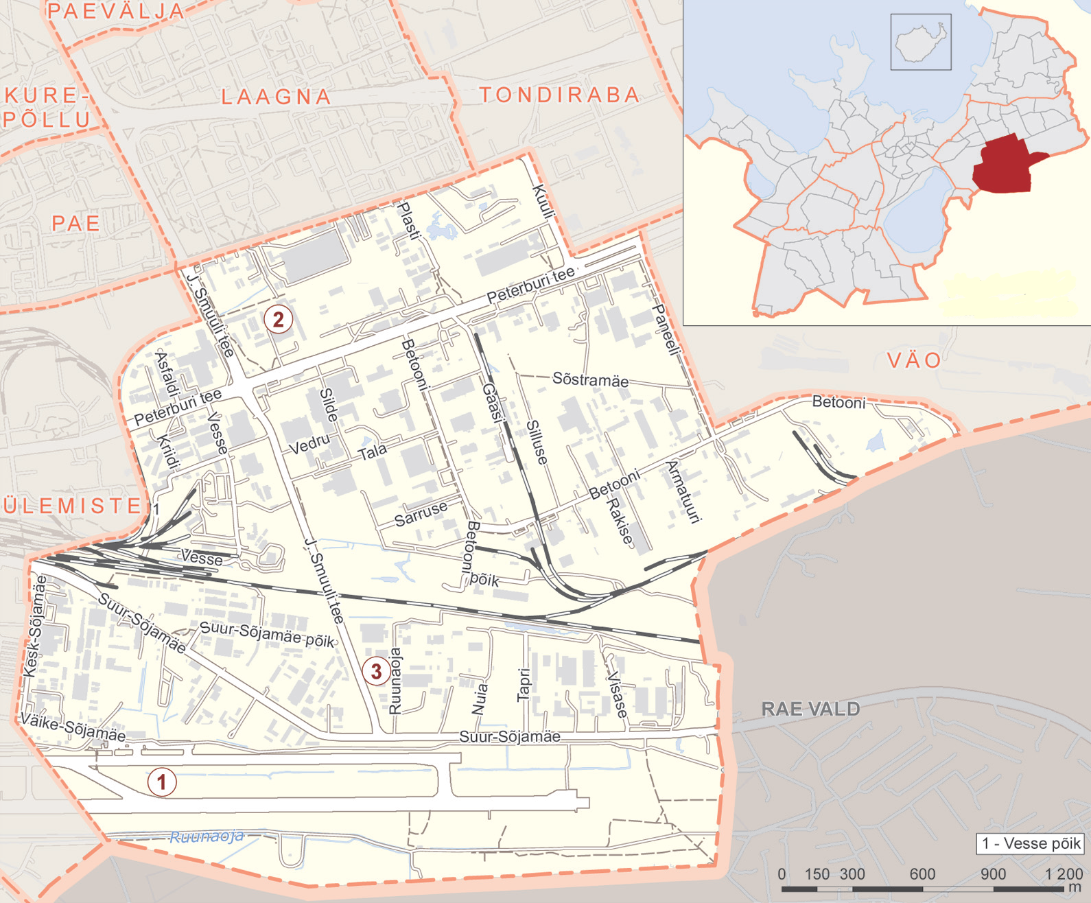 Sõjamäe asumi kaart